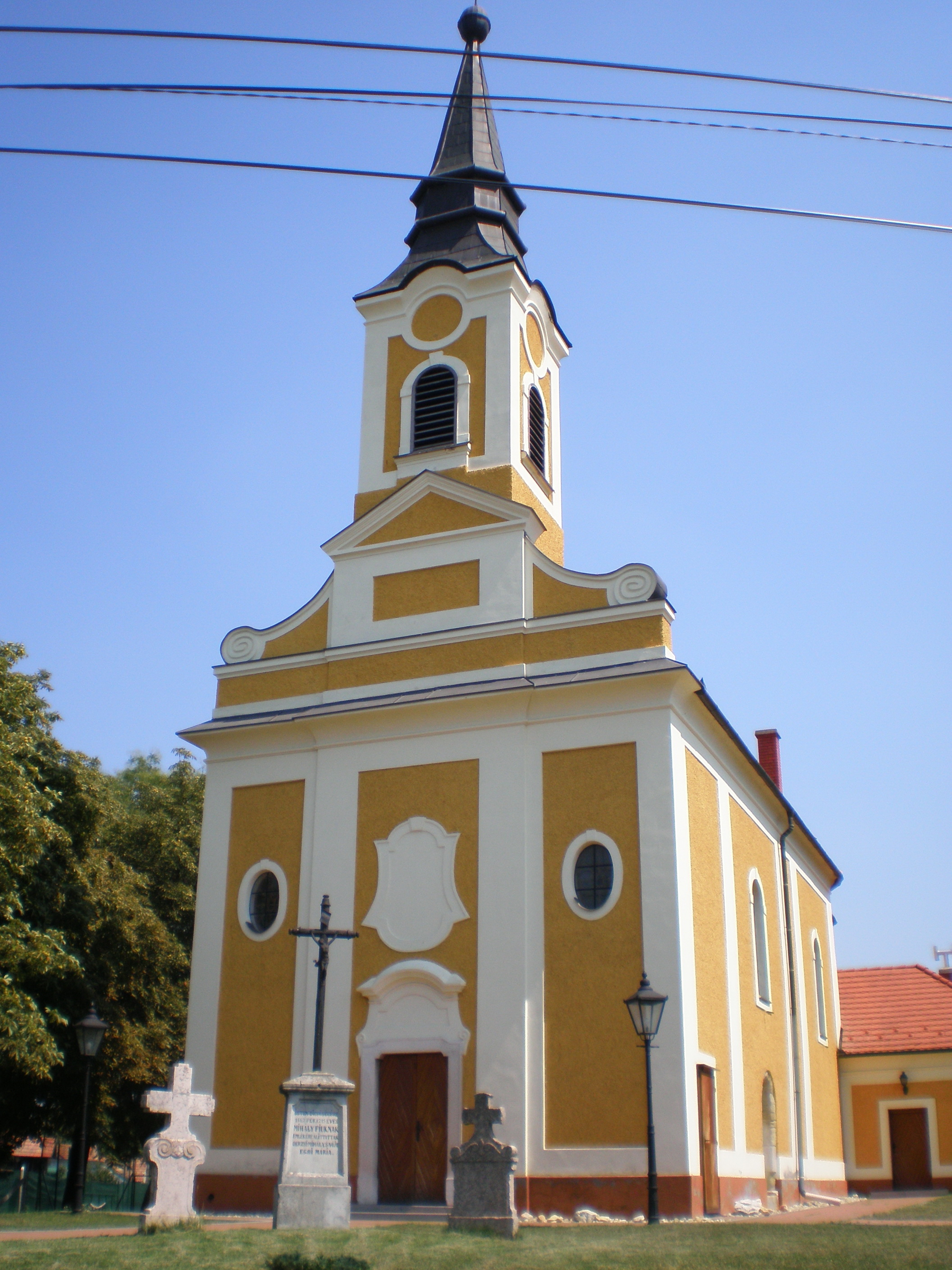 Szent László római katolikus templom